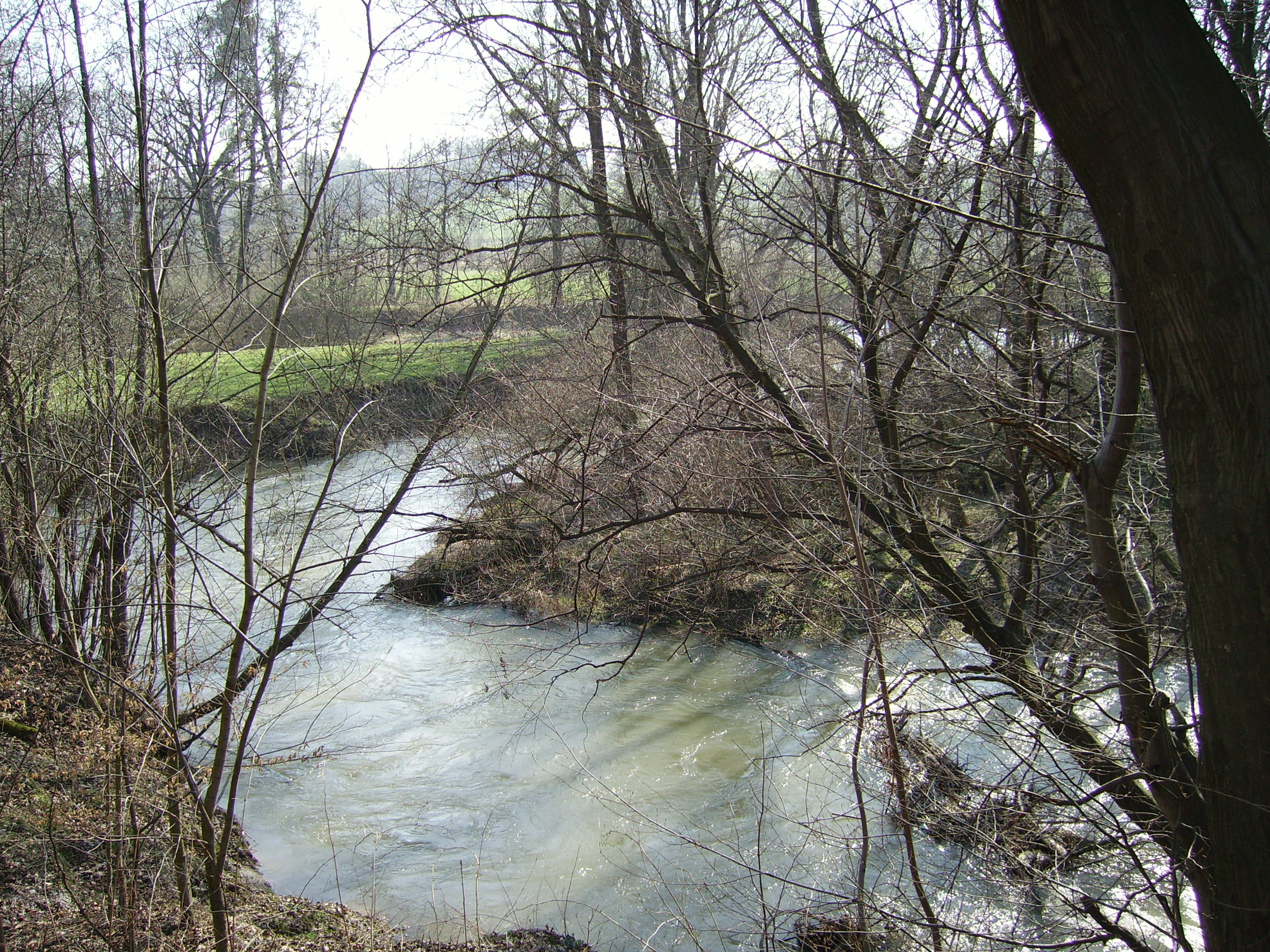 Meandry Lučiny; Havířov